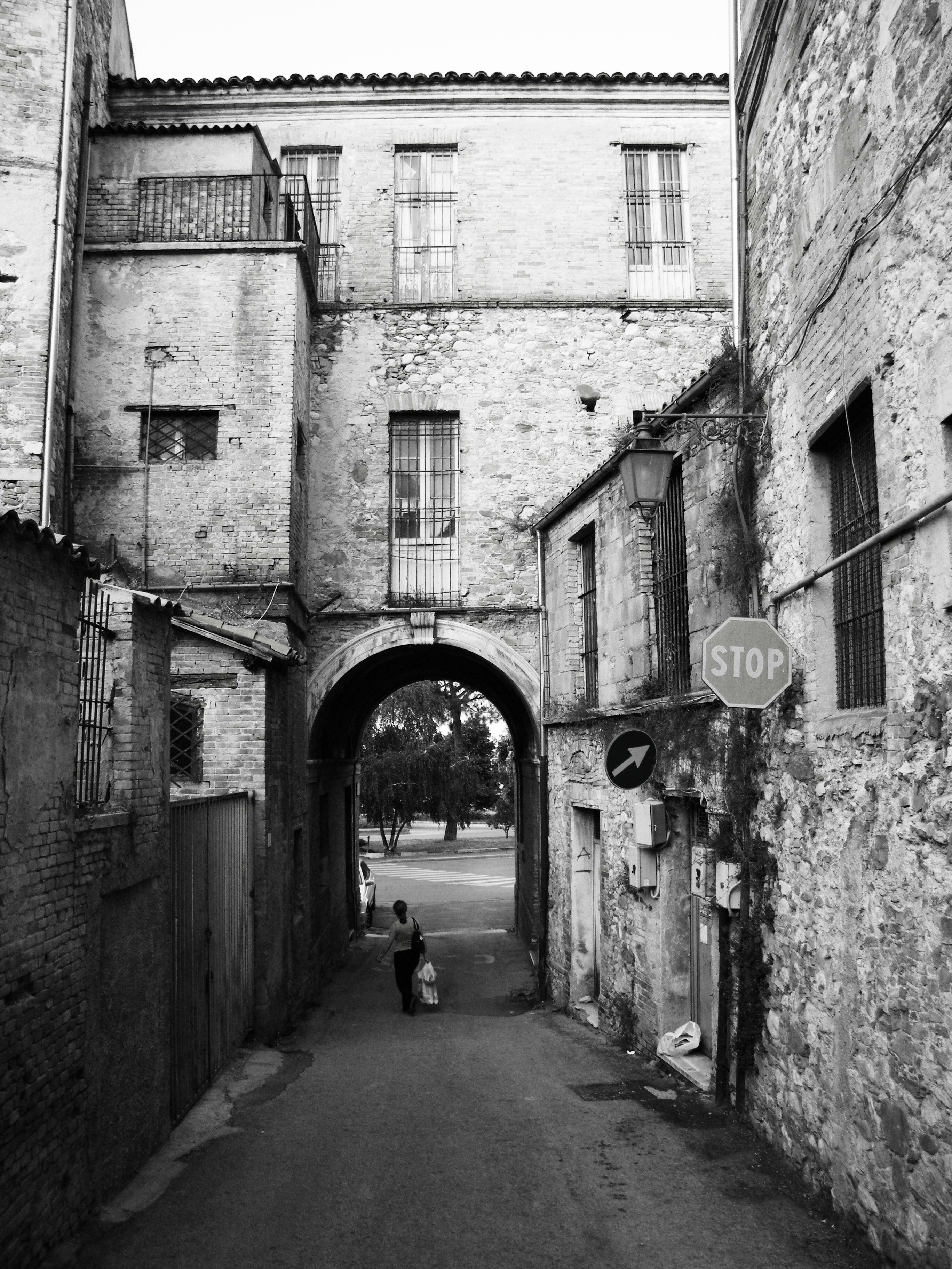 Antica porta di accesso cittadina, risalente al XIV sec...il suo nome nn è noto, ma viene comunemente chiamata Porta Melatina proprio come la "vera" Porta Melatina, sita nelle sue estreme vicinanze.